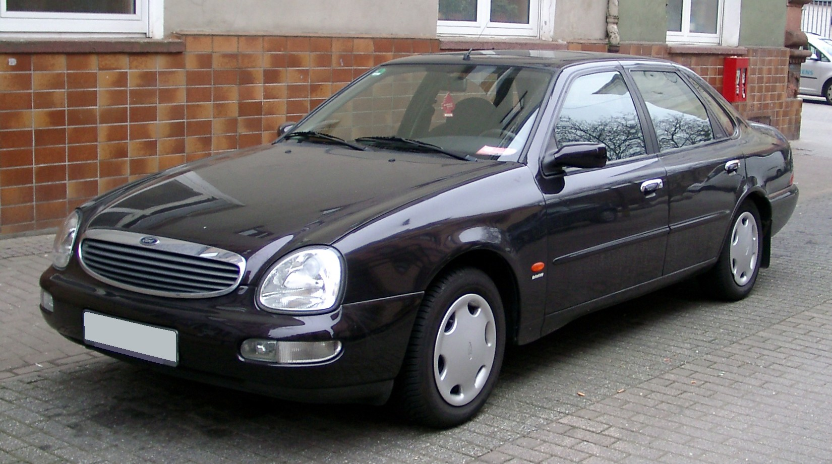 Ford Scorpio, 2. Generation